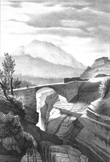 Pont Bernard sur le Drac (Aspres-lès-Corps, à hauteur de "Beaufin"). « Si vous avez jamais suivi l'ancienne route de Gap, vous avez dû remarquer, à une lieue de Lesdiguières, un pont pittoresque jeté sur le Drac. Cest le Pont-Bernard. (...) Avant que le pont de la Guinguette fût construit, il fallait passer sur le Pont-Bernard pour aller à Gap et depuis une nouvelle route a été établie : le pont, devenu solitaire, commence à sentir les ravages du temps, et ce n'est pas sans effroi que l'habitant de ces montagne le traverse aujourd'hui. »